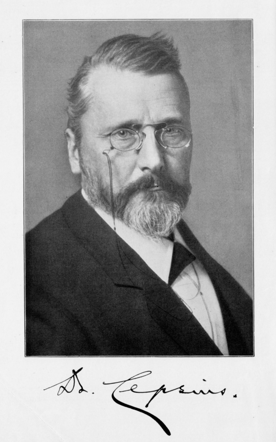 Portrait Prof. Dr. Richard Karl Georg Lepsius (Fotograf Wilhelm Weimer)